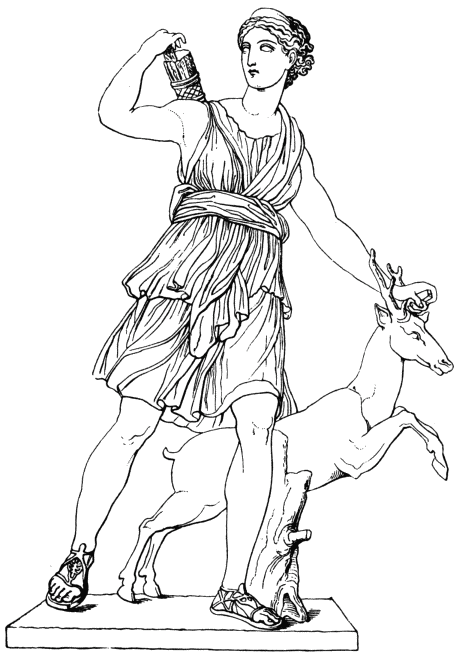 Greek Goddess Artemis